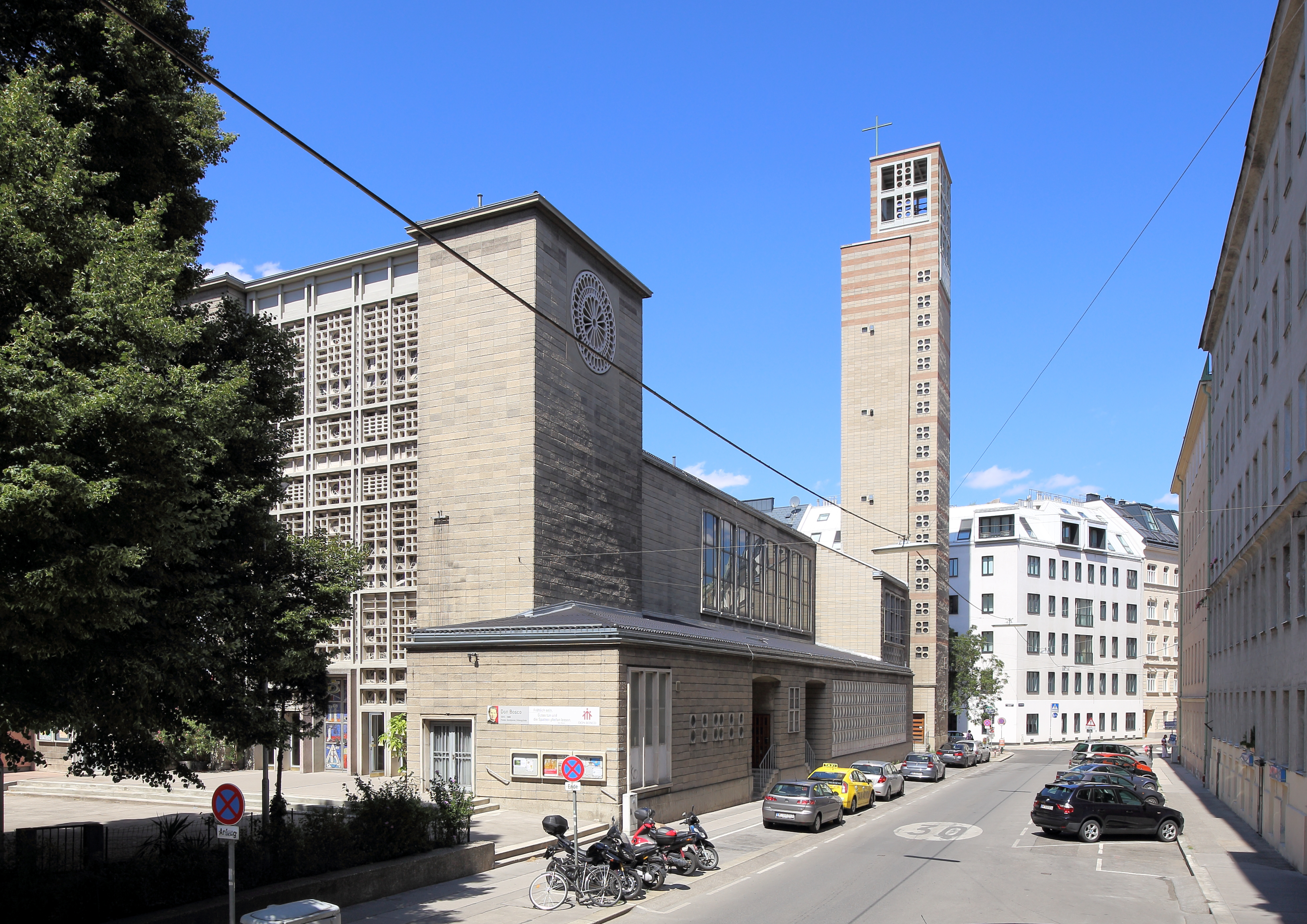 Die röm.-kath. Pfarrkirche hl. Johannes Don Bosco in Neuerdberg, ein Ortsteil des 3. Wiener Gemeindebezirkes Landstraße..Die Kirche wurde nach Plänen des Architekten Robert Kramreiter von 1954 bis 1958 errichtet.